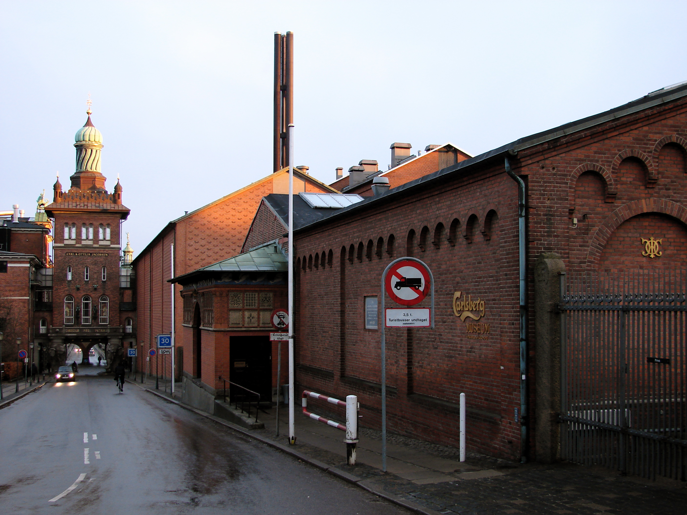 Carlsberg Museet, Valby Bakke, København